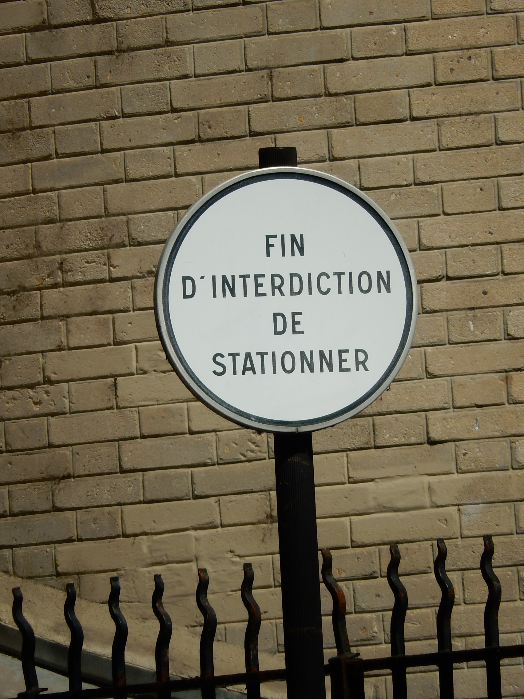 Un panneau français B39, photographié dans le seizième arrondissement de Paris, annonçant la fin d'une interdiction de stationner sur le quai Louis Blériot.